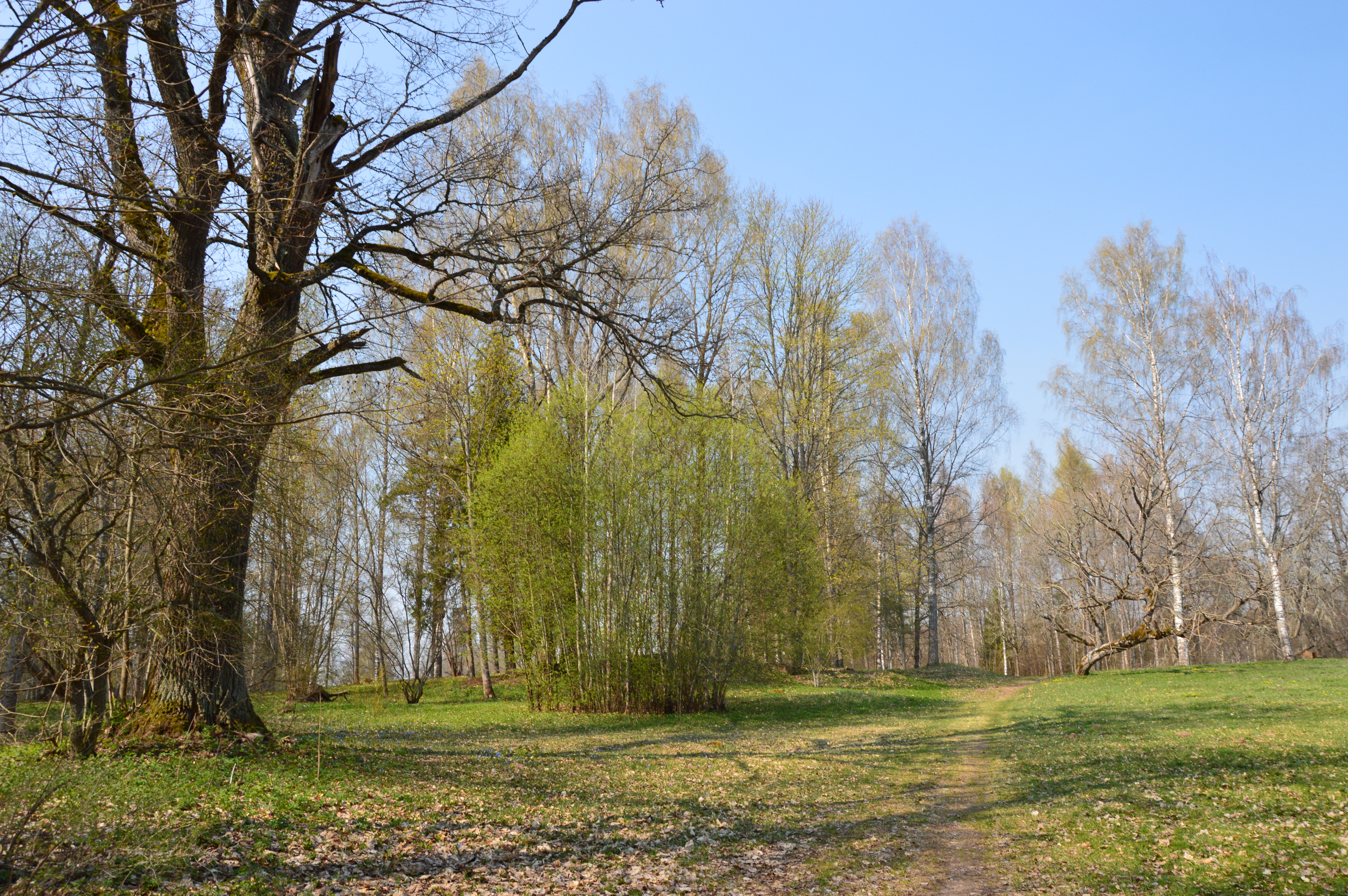 Mõniste mõisa park